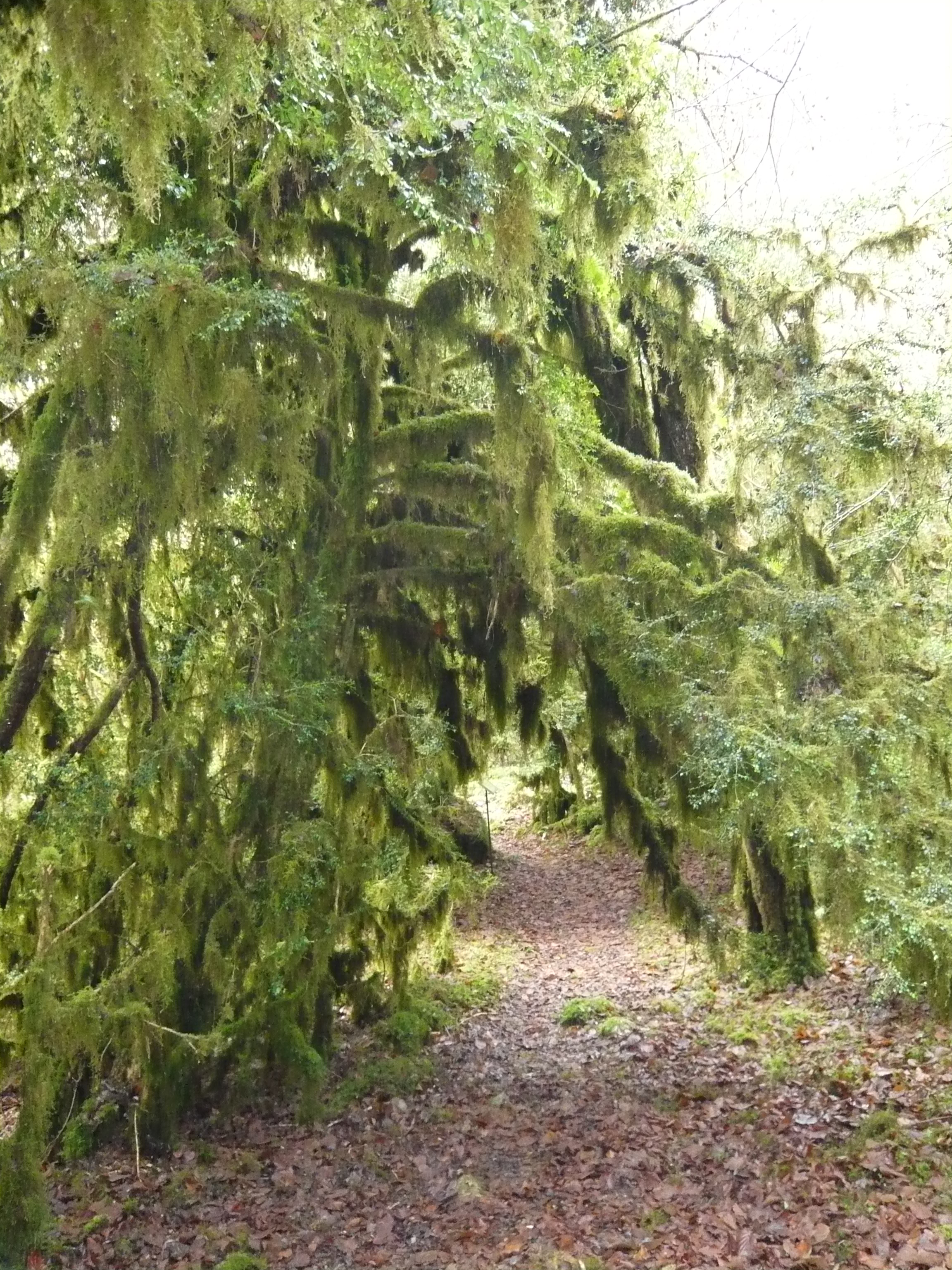 Sur les rives de l'Arros (65)